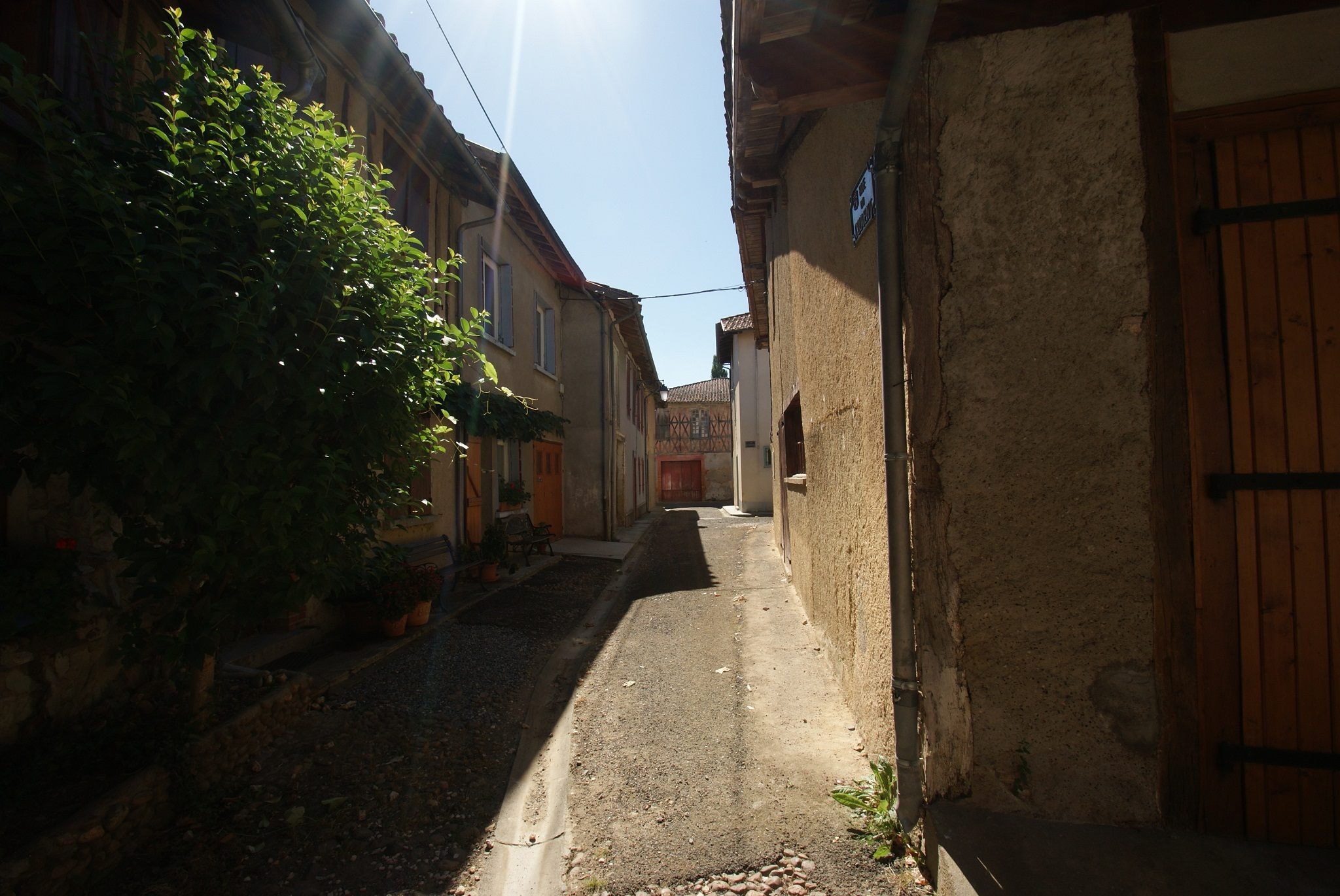 Eén van de vele straten van Simorre.